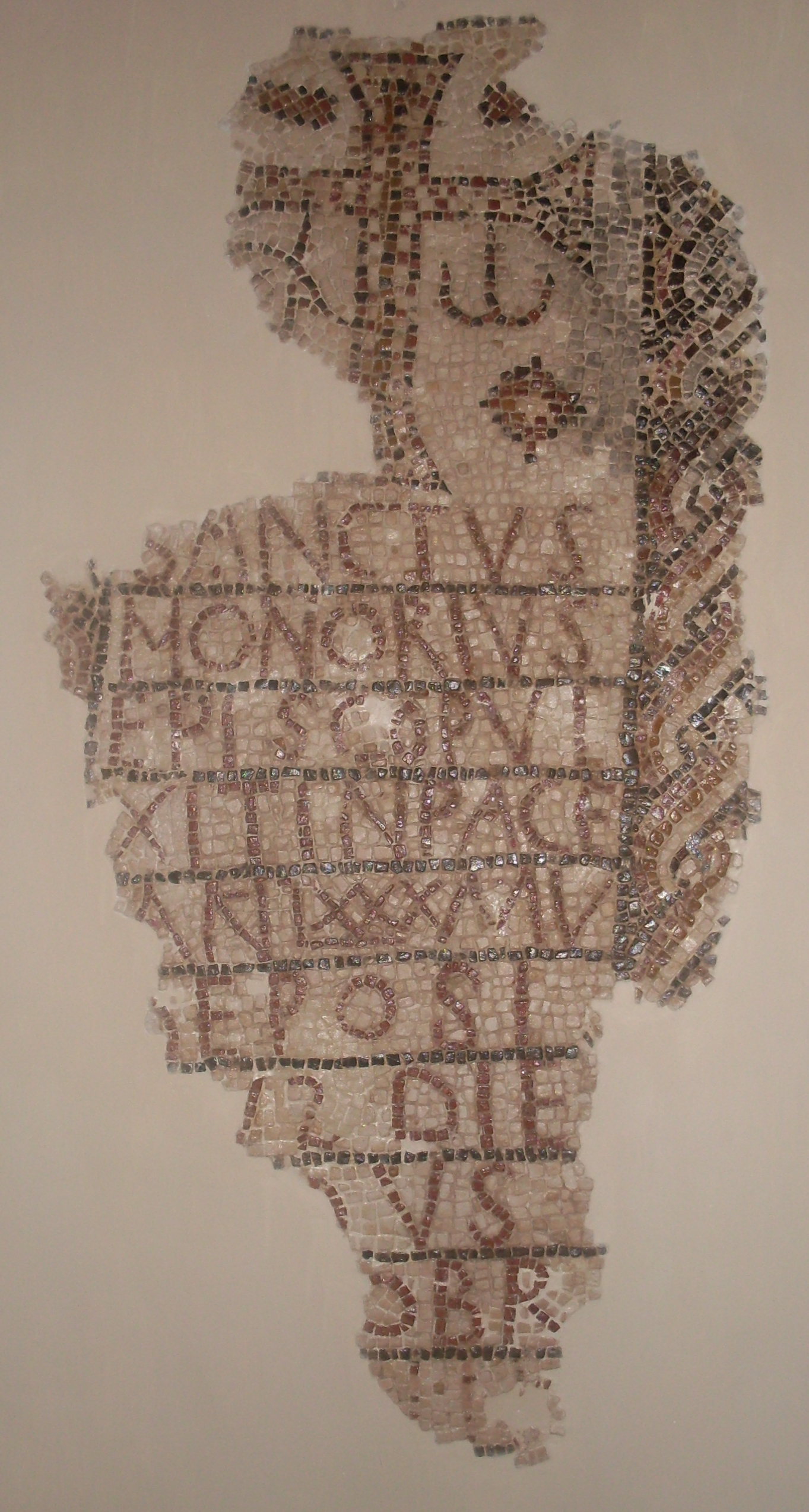 Mosaico funerario romano-paleocristiano del Obirspo Honorio, procedente de Sbeïtla (Túnez), depositado en el Museo del Bardo en Túnez, correspondiente con AE 1937, 23: Sanctus / onorius / episcop(us) vi/xit in pace / an(nos) LXXX m(enses) V / deposi/[t]us die / [--- I]dus / [Oct]obr(es) /